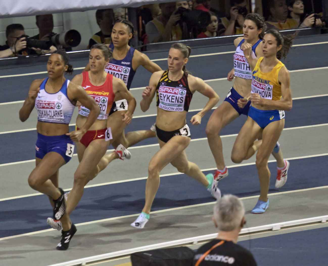 EKI30425 finale 800m dames eykens